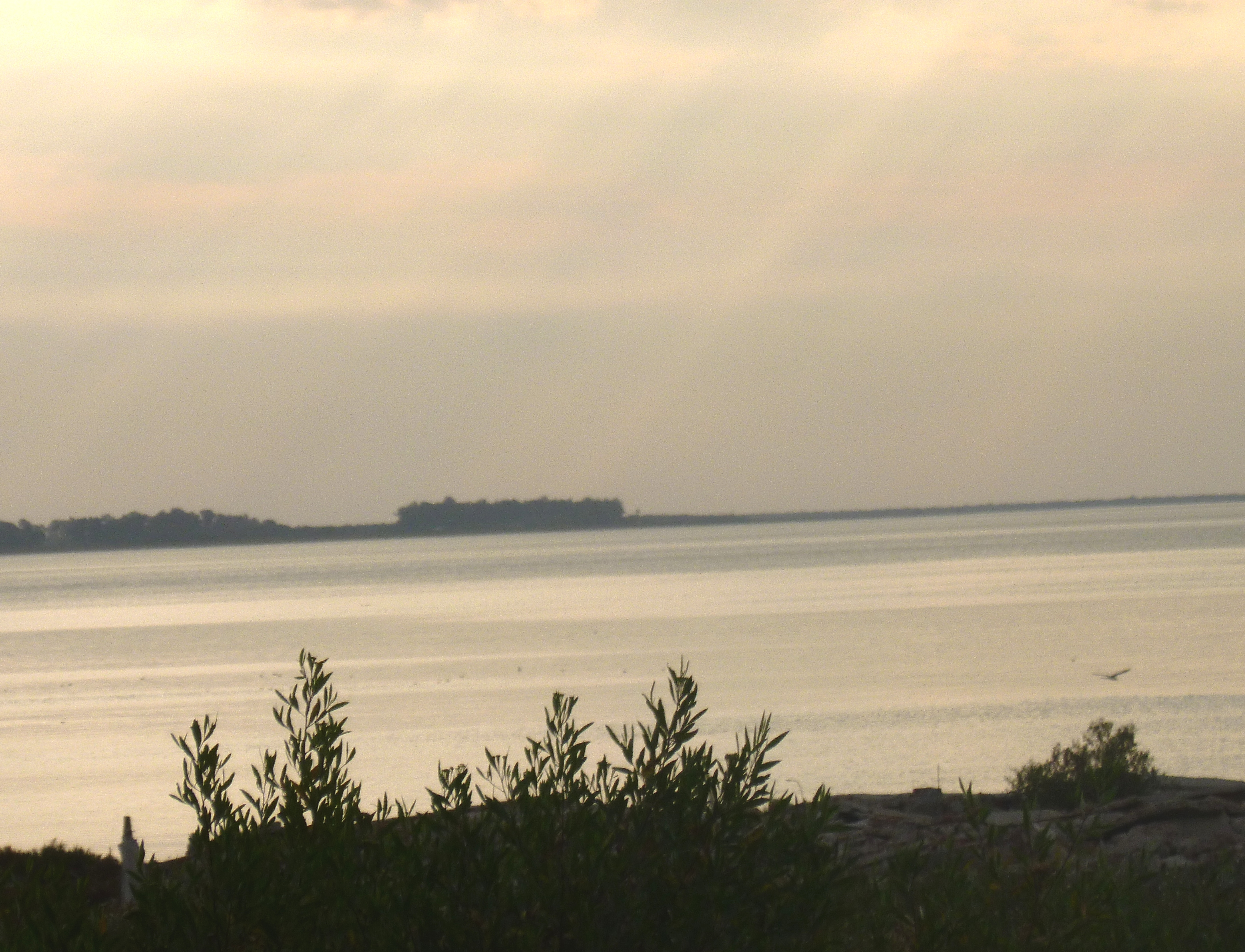 Vista desde tierra en los Bañados del Rio Dulce y Laguna Mar Chiquita(Reserva Provincial de Cordoba-Argentina_Declarada sitio Ramsar